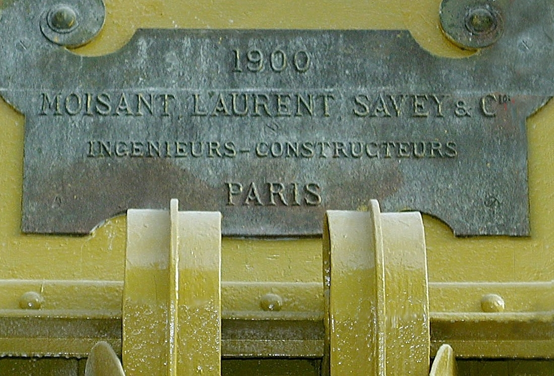 Plaque M.L.S.et Cie